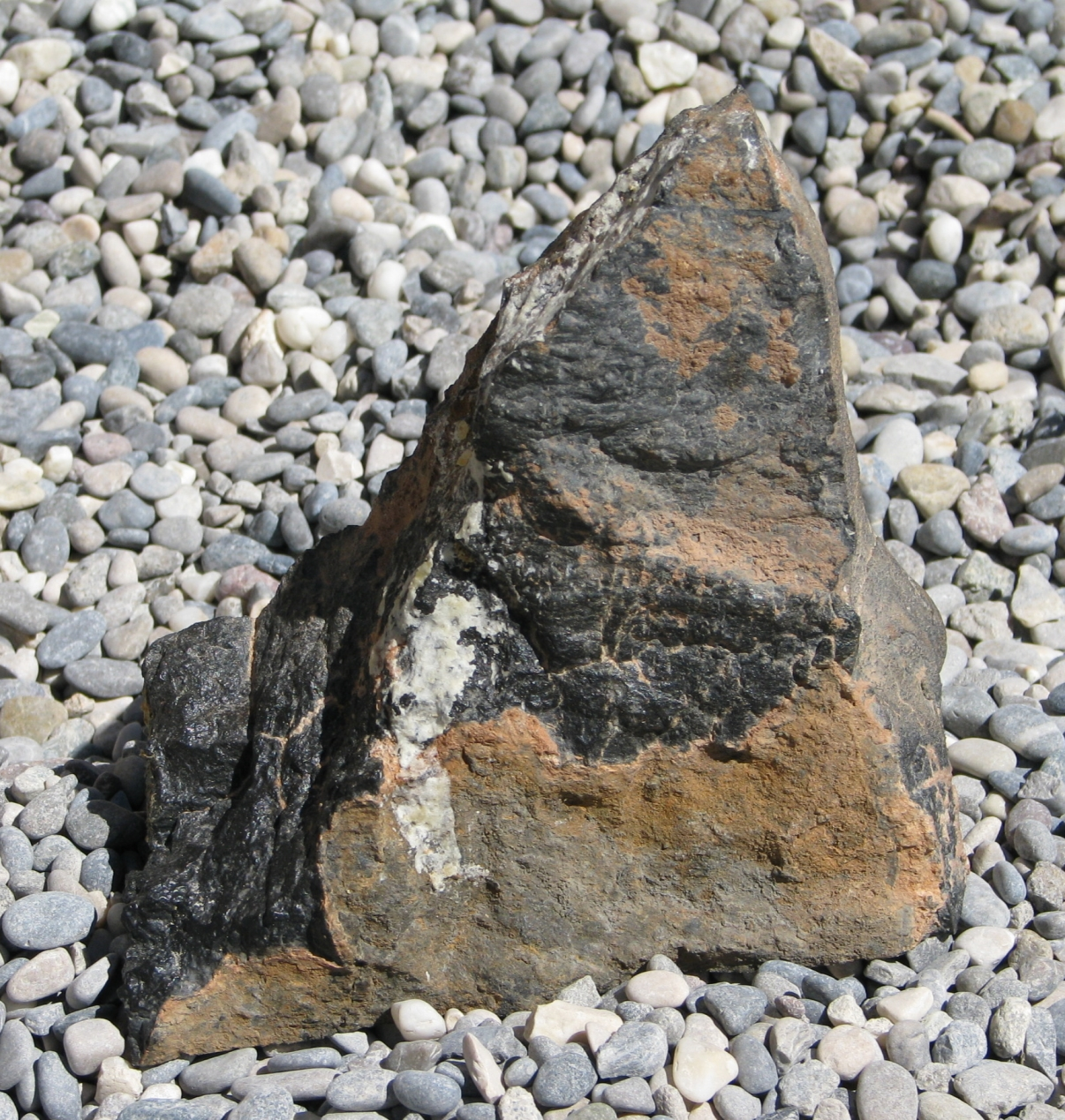 Fundort: Hammadah al Hamra - Libysche Sahara Website